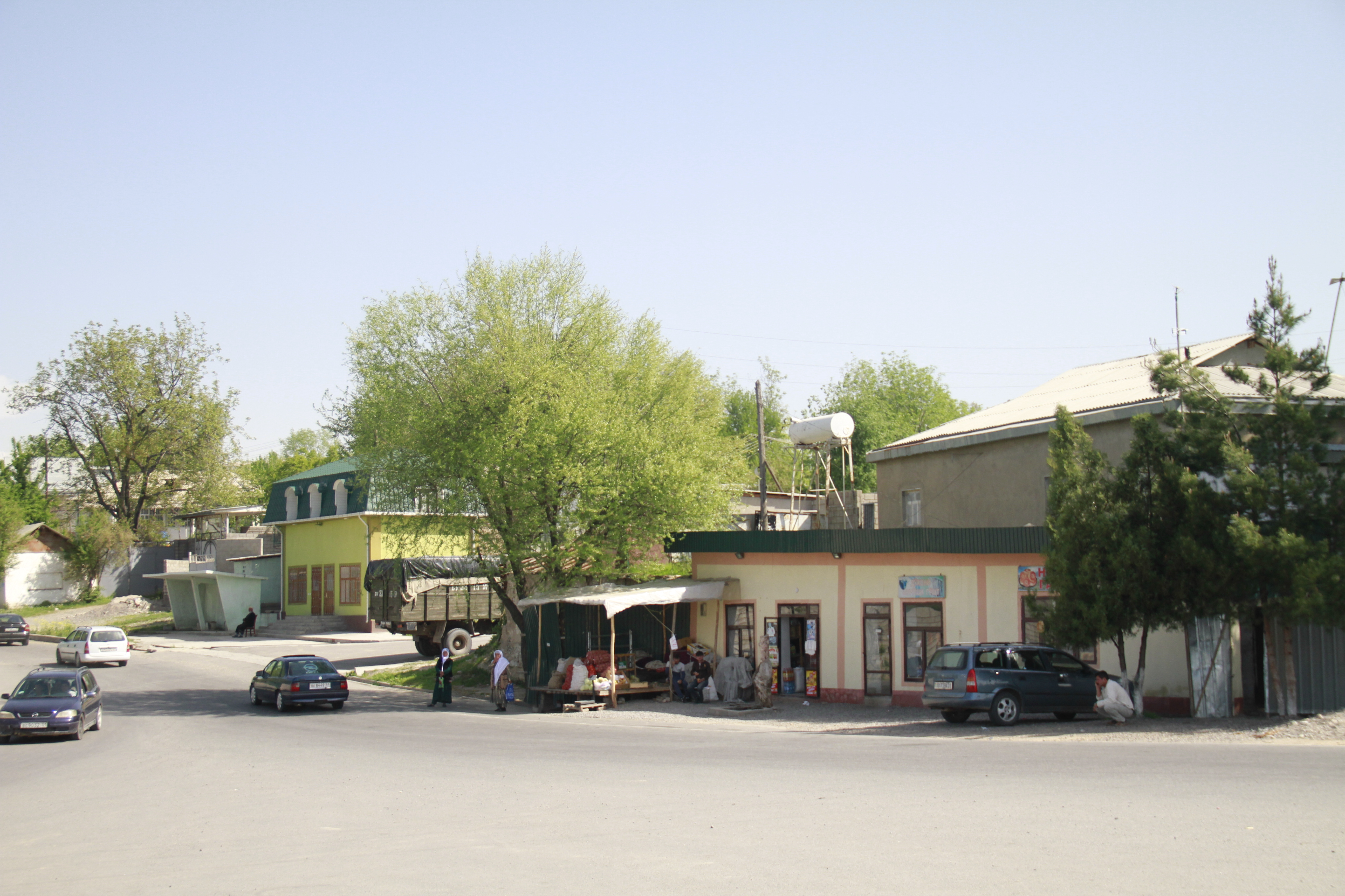 Тоҷикӣ: Ш. Ҳисор, д. ғайратобод (3)